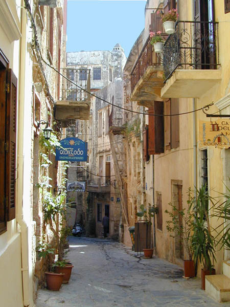 La Canée est construite sur l'emplacement de la ville antique de Kydonia. Pendant la période néopalatiale, Kydonia est un centre important. Il en est de même durant les périodes romaines et byzantines. Les vénitiens y construisent une forteresse sur la colline qui domine le port, ainsi qu'une cathédrale, un palais, un théâtre et de nombreuses maisons pour les nobles. Des remparts sont élevés en 1537 pour se protéger d'une invasion turque mais la ville est prise par eux en 1645. Aujourd'hui, La Canée est la 2ème ville de Crète, c'est celle qui a le mieux conservé les traces de son passé. (Les photos numériques ont été prises en 2001)